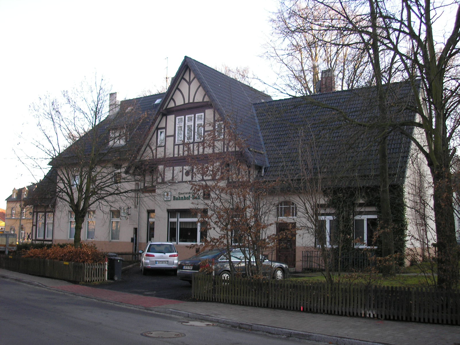 Der Bahnhof Ilmenau Bad von der Naumannstraße aus betrachtet.